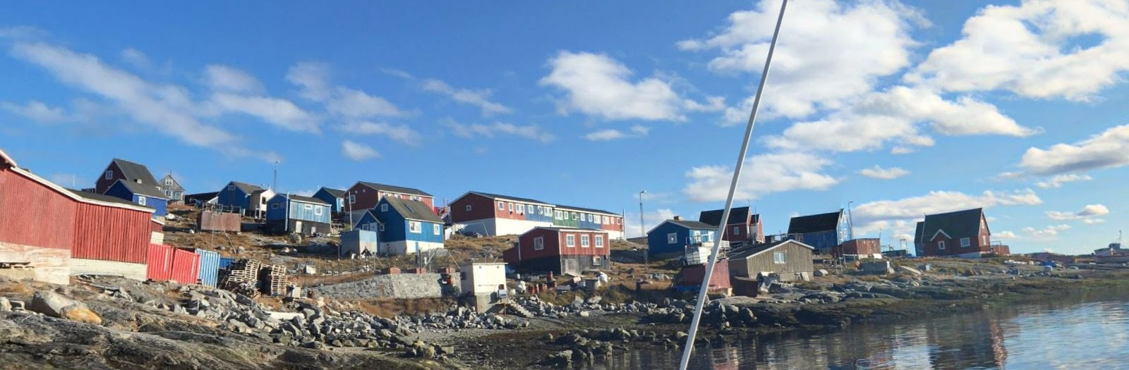 Niaqornaarsuk